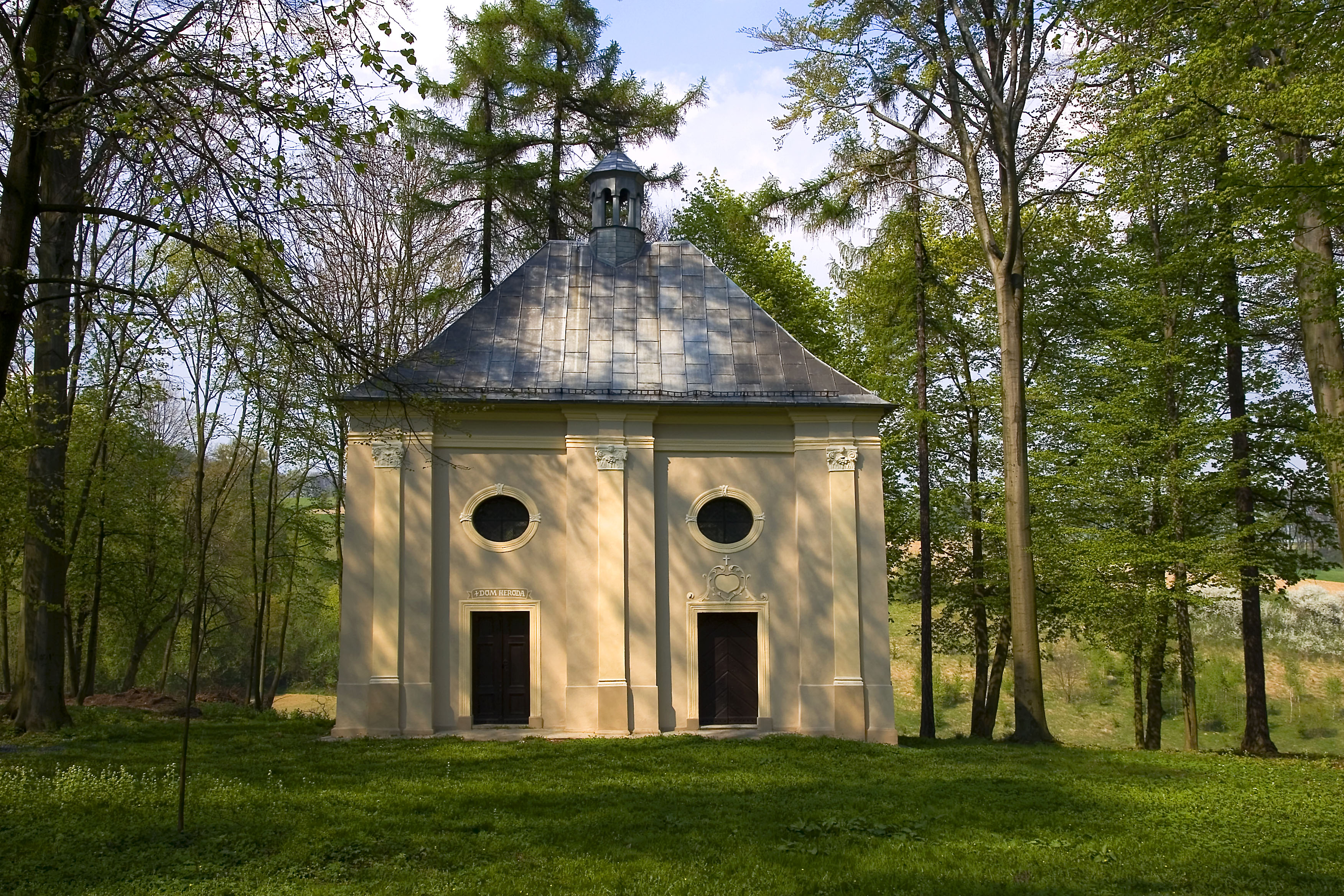 Góra św. Anny, kaplica Pałac Heroda, Gmina Leśnica, powiat strzelecki